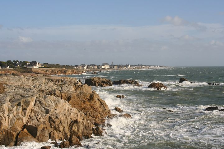 La côte sauvage du Croisic (Loire Atlantique, France).